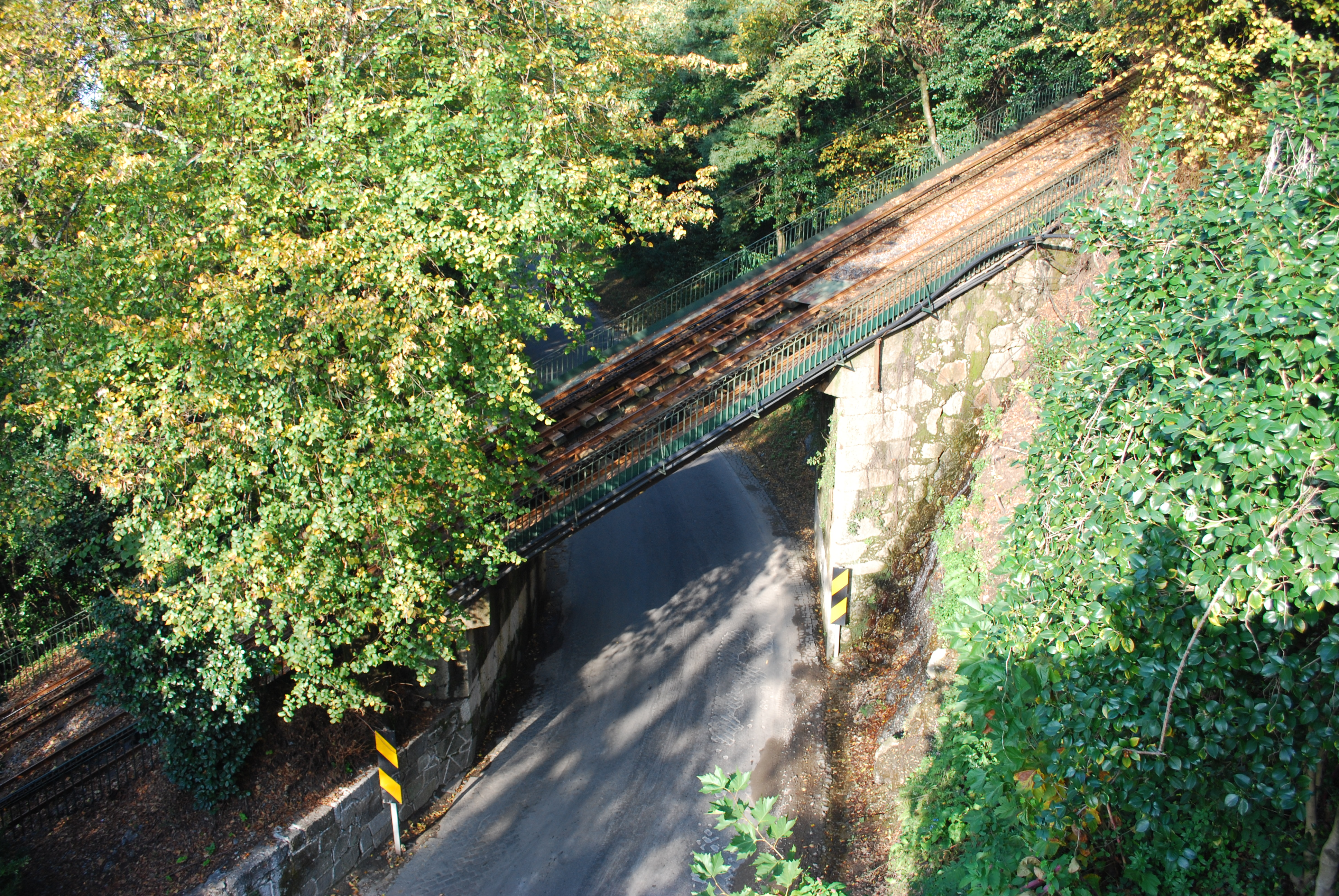 Os carreis do Elevador do Bom Jesus do Monte por cima duma rua.